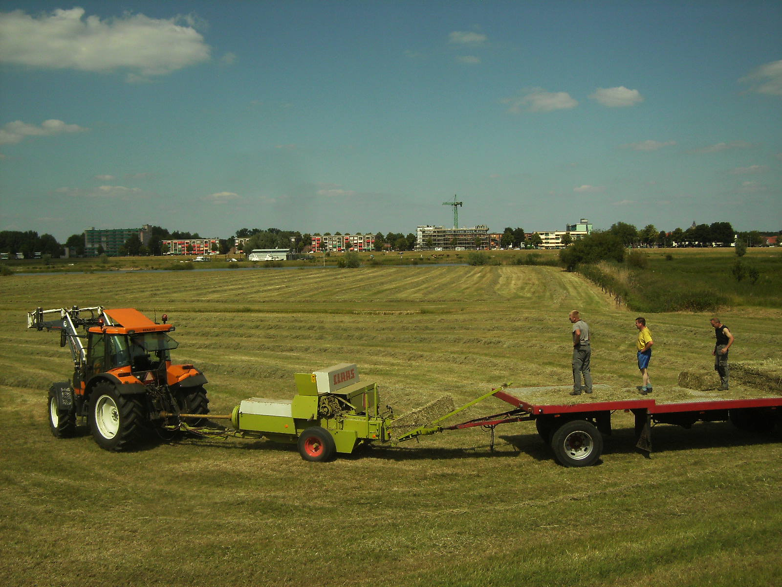 Hooioogst in uiterwaard de Ossenwaard langs de IJssel tegenover Deventer